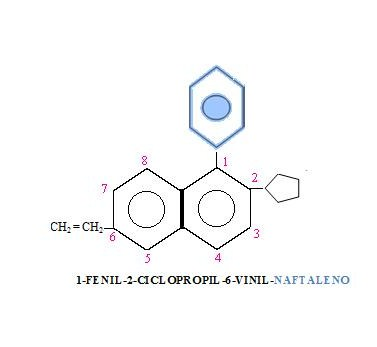 Ejemplo de un compuesto aromatico policiclico